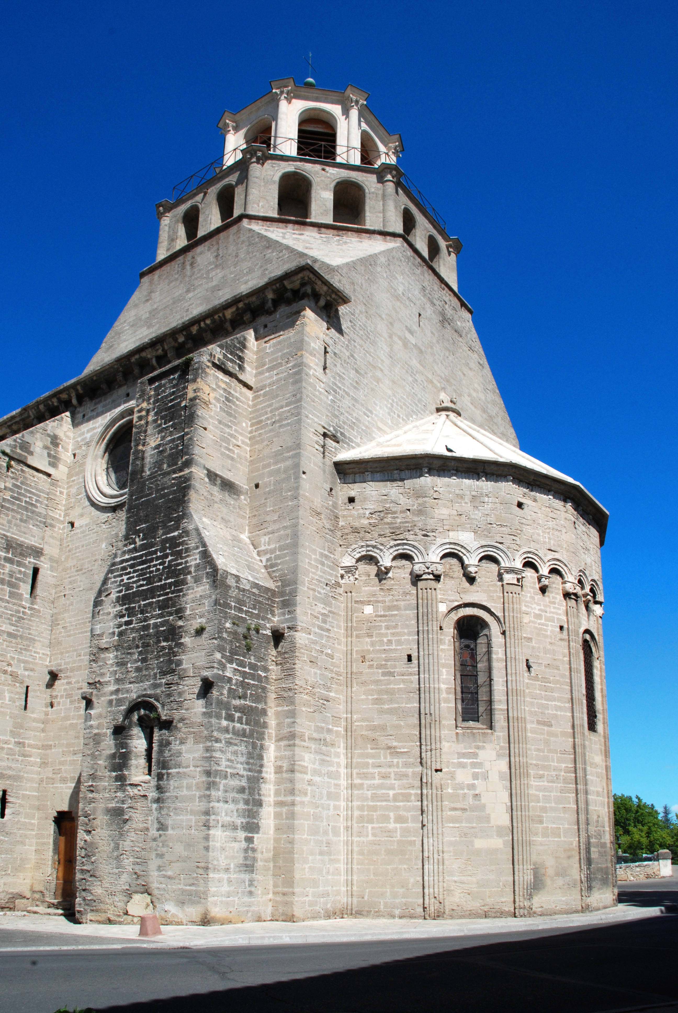 France - Provence - Vaucluse - Église Notre-Dame-du-Lac du Thor